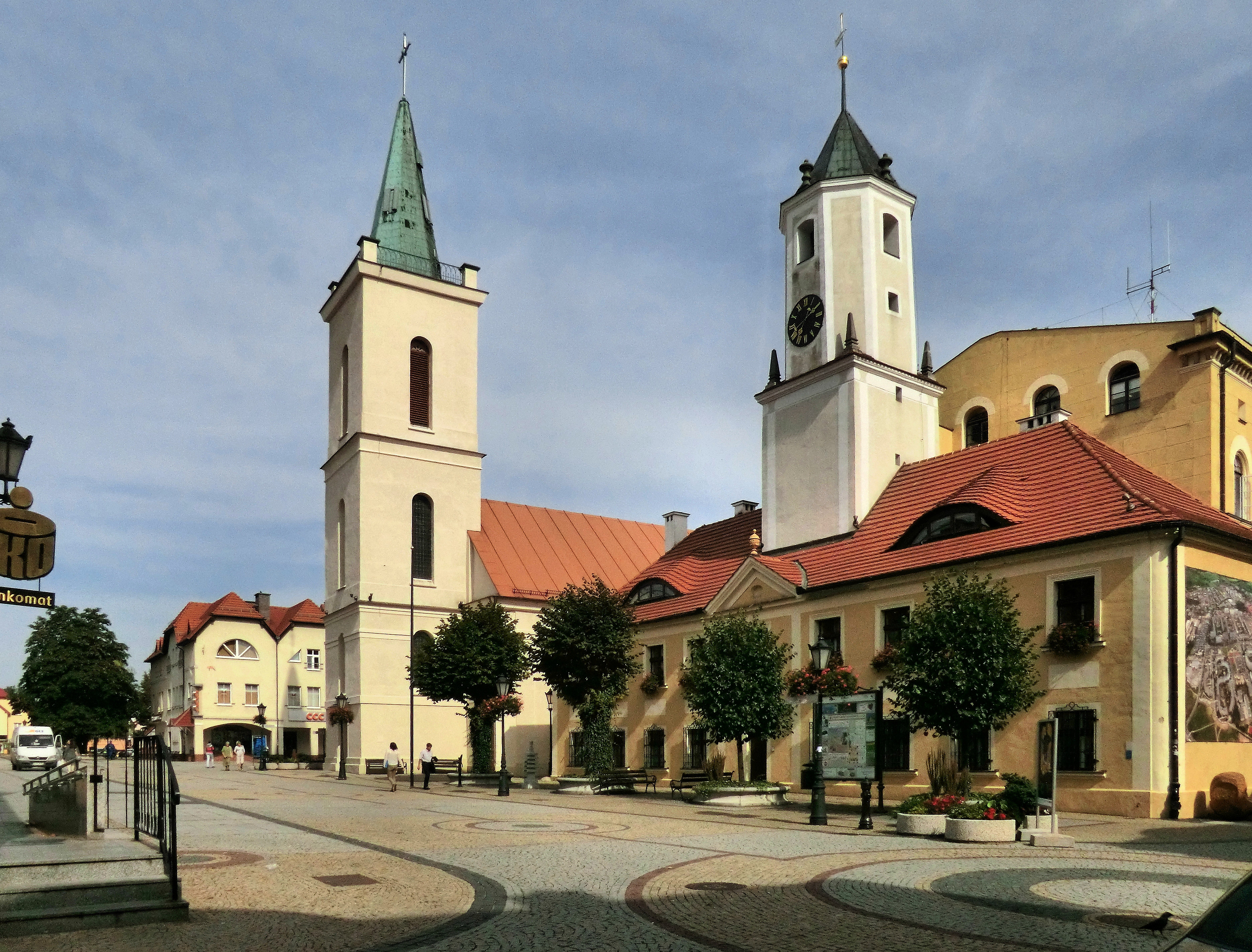 Ośrodek historyczny miasta Polkowice, Polkowice